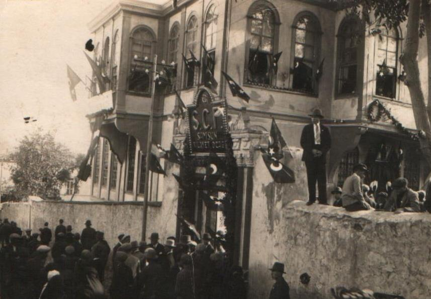 Serbest Cumhuriyet Fırkası Samsun İl Başkanlığı binası önünde çekilmiş bir fotoğraf.